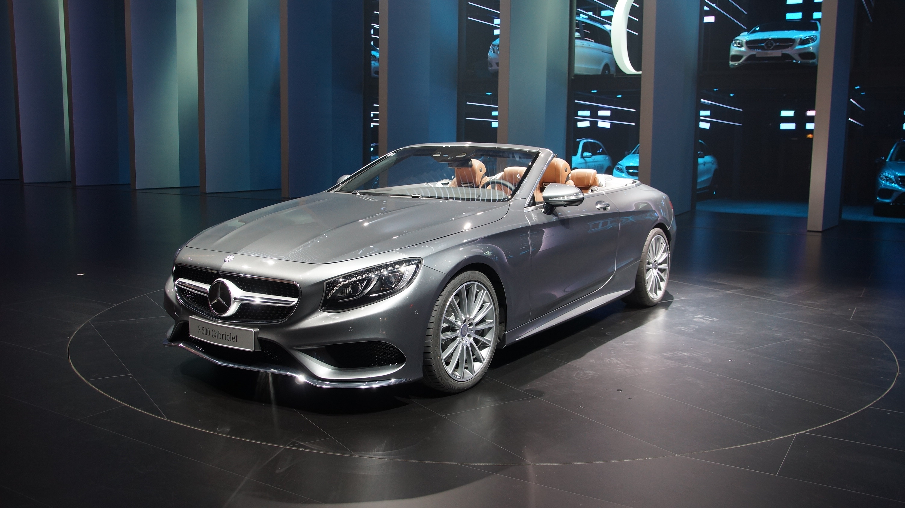 Mercedes-Benz S 500 Cabriolet bei der IAA 2015 in Frankfurt am Main